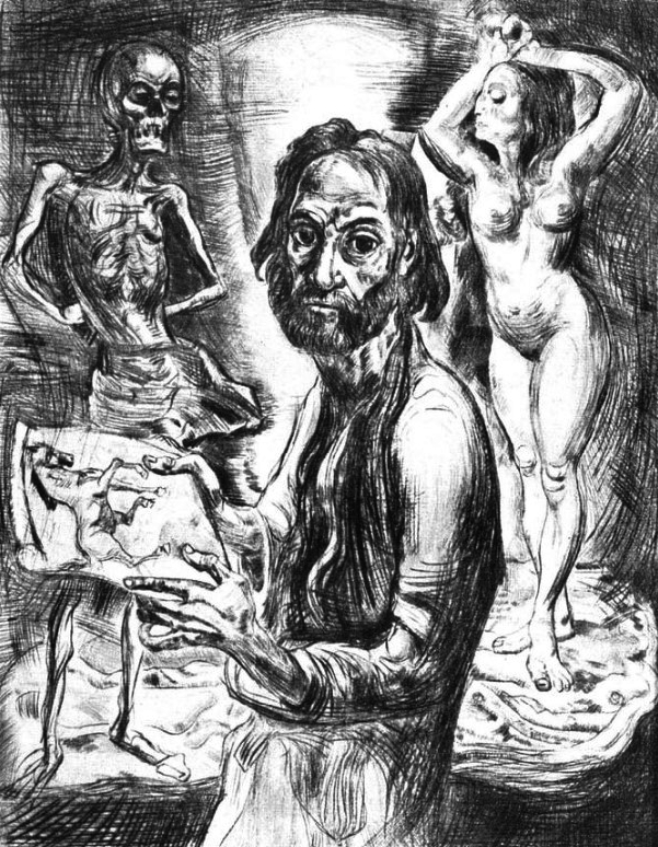 Grosses Selbstbildnis, 1930, Johann Robert Schürch (1895–1941) Zeichner, Maler, Graphiker